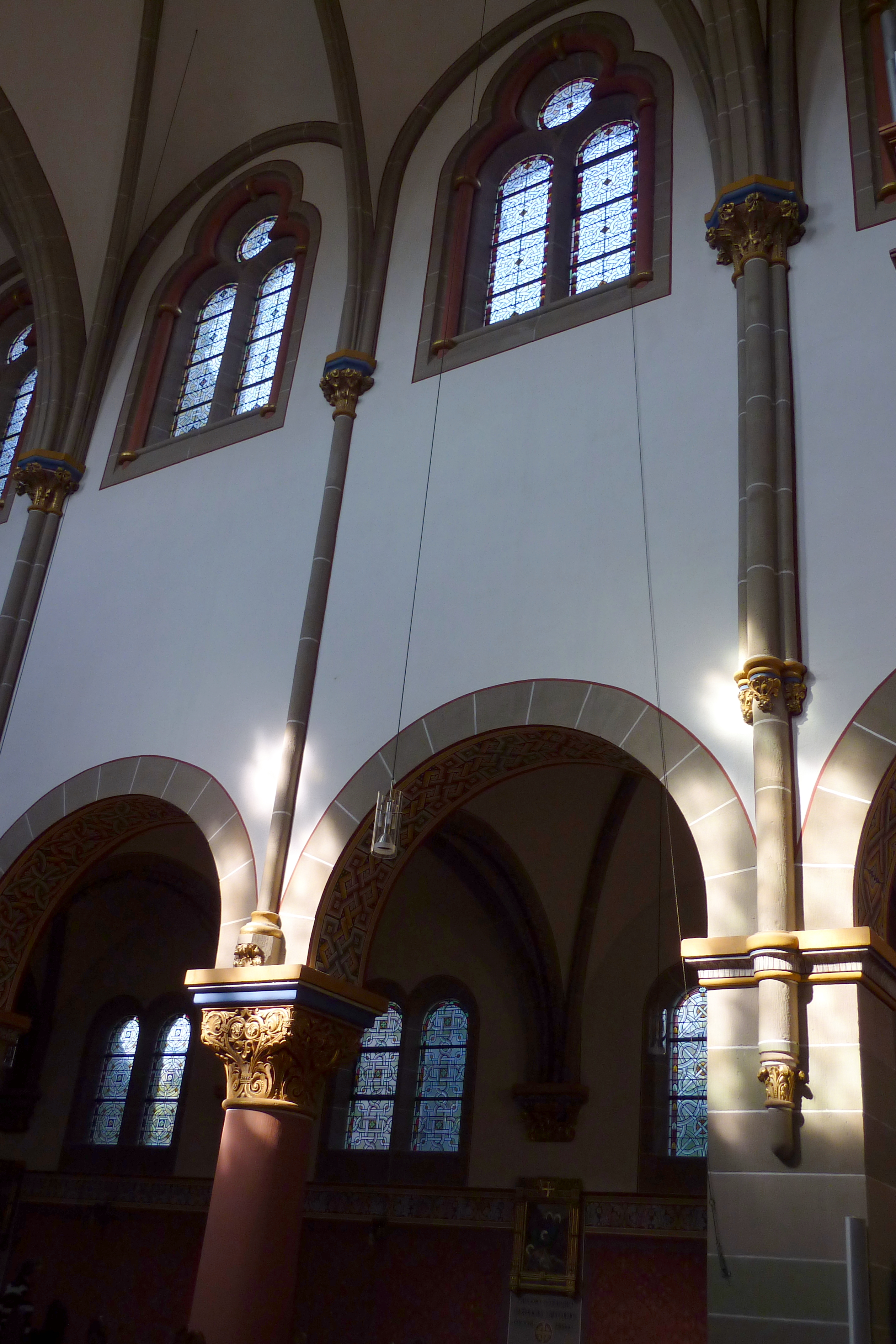 katholische Pfarrkirche in Bad Neuenahr, genannt Rosenkranzkirche